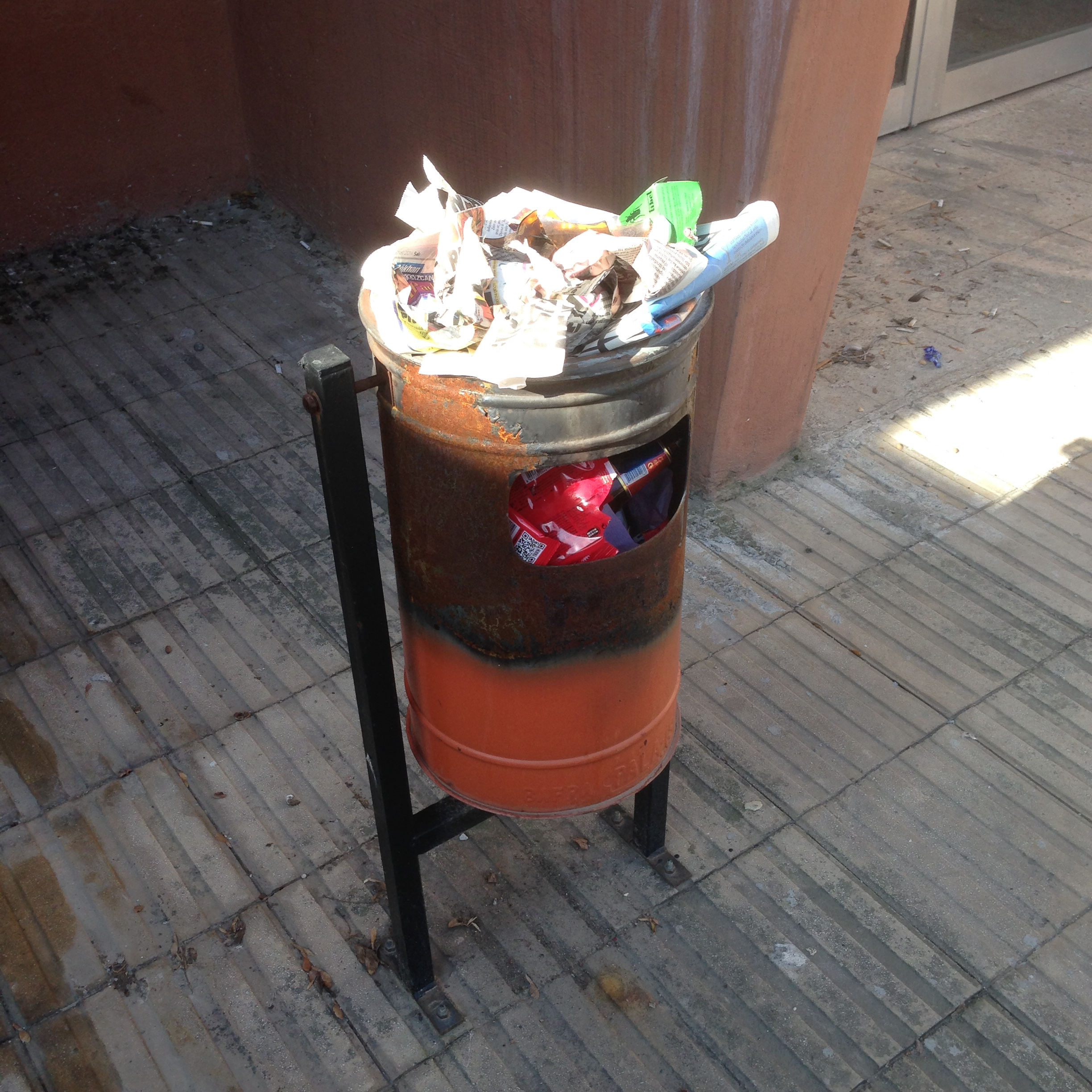 Bafra'dan çeşitli görüntüler